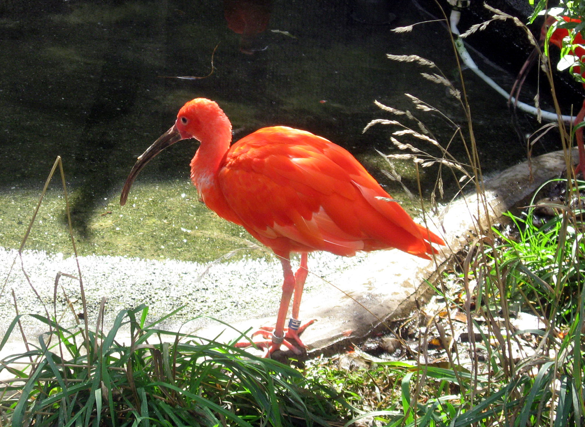 Ibis rudý